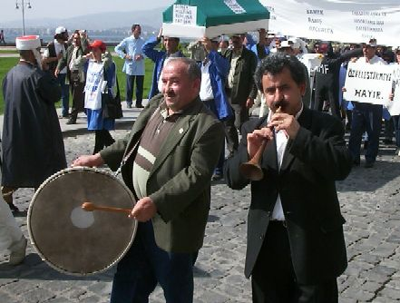 Duo davul zurna pendant les manifestations du 1 mai 2002 à İzmir. Photographie personnelle libre de droits.